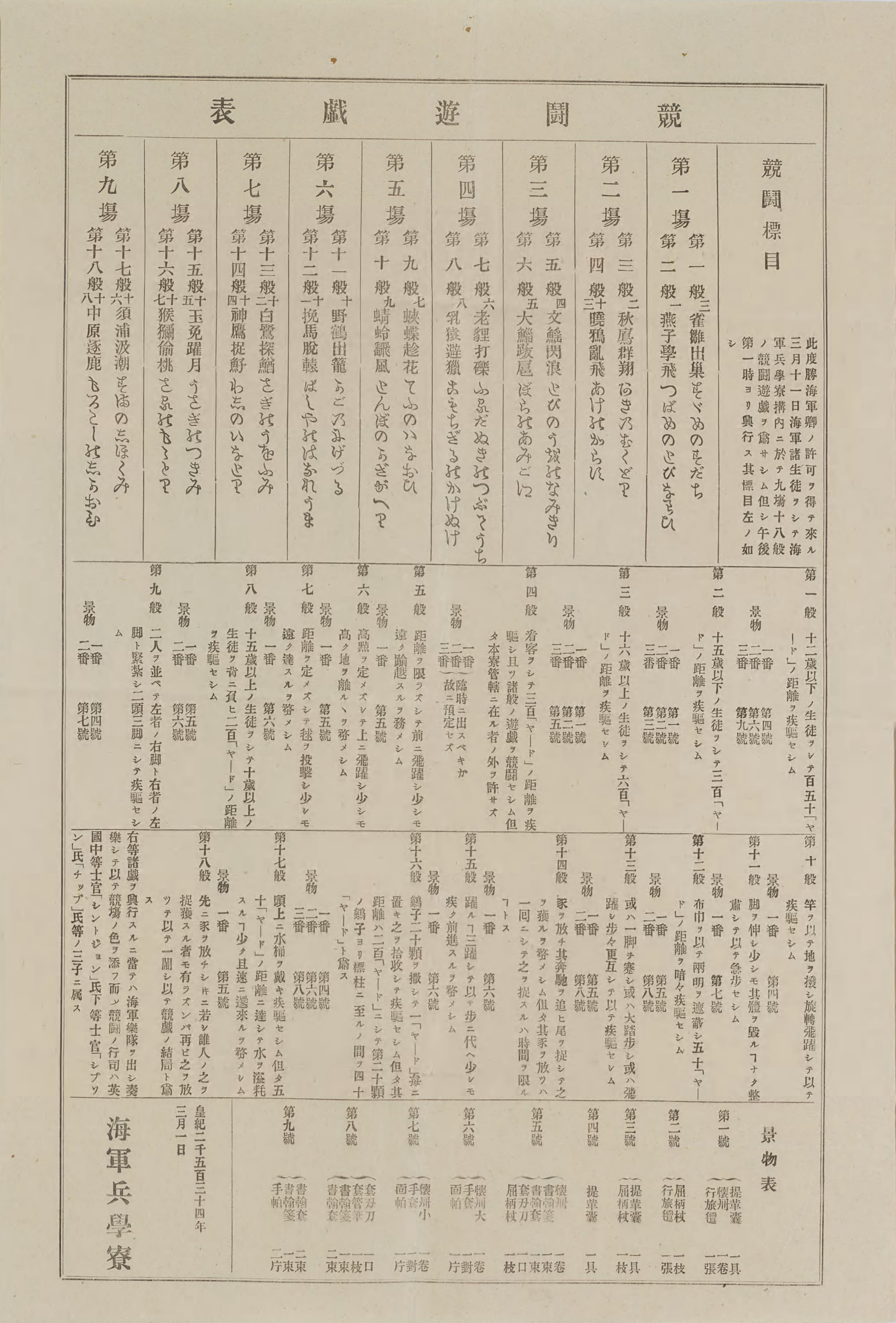 競闘遊戯表